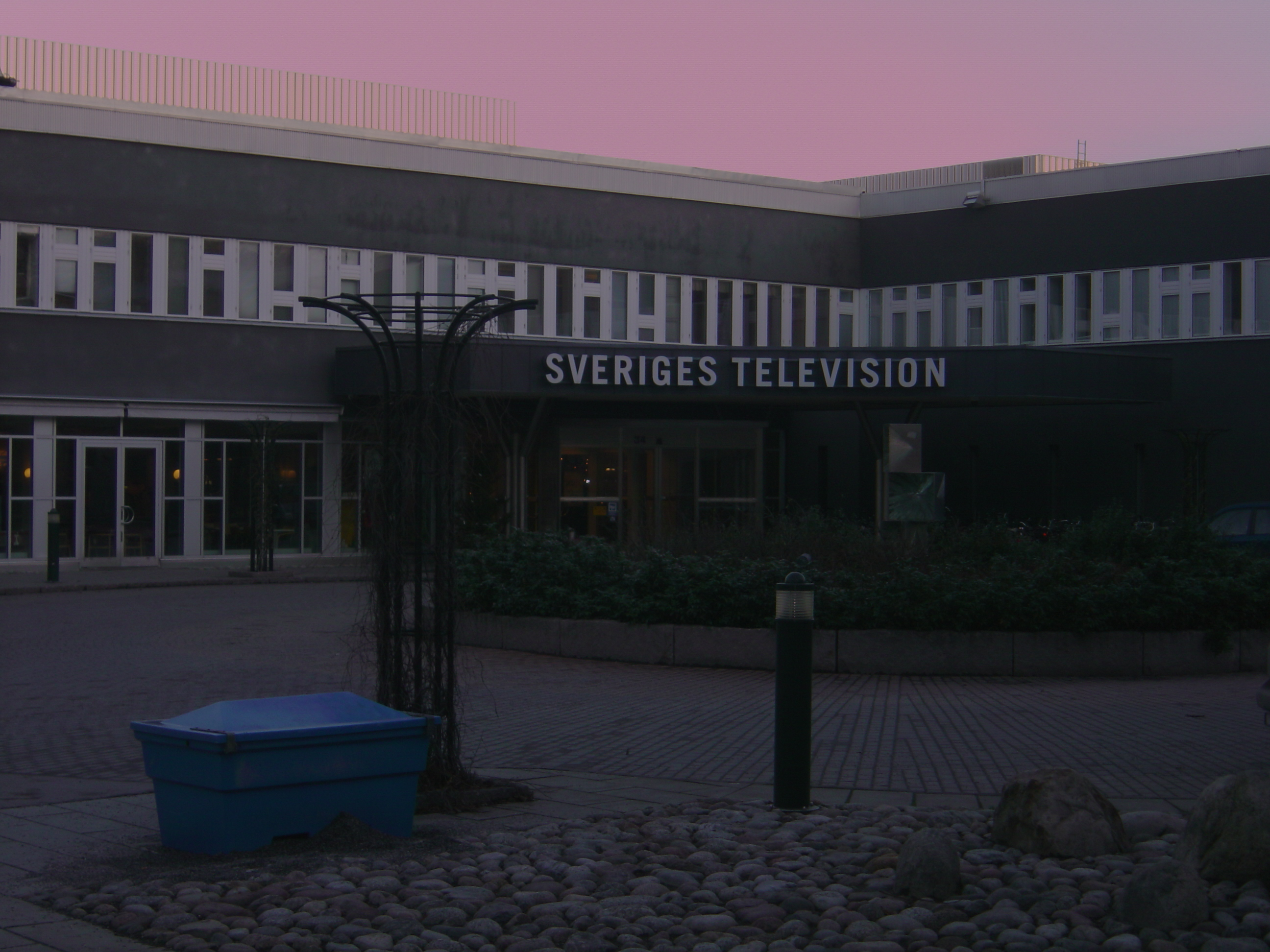 Sveriges Televisions entré, Stockholm, Sverige.